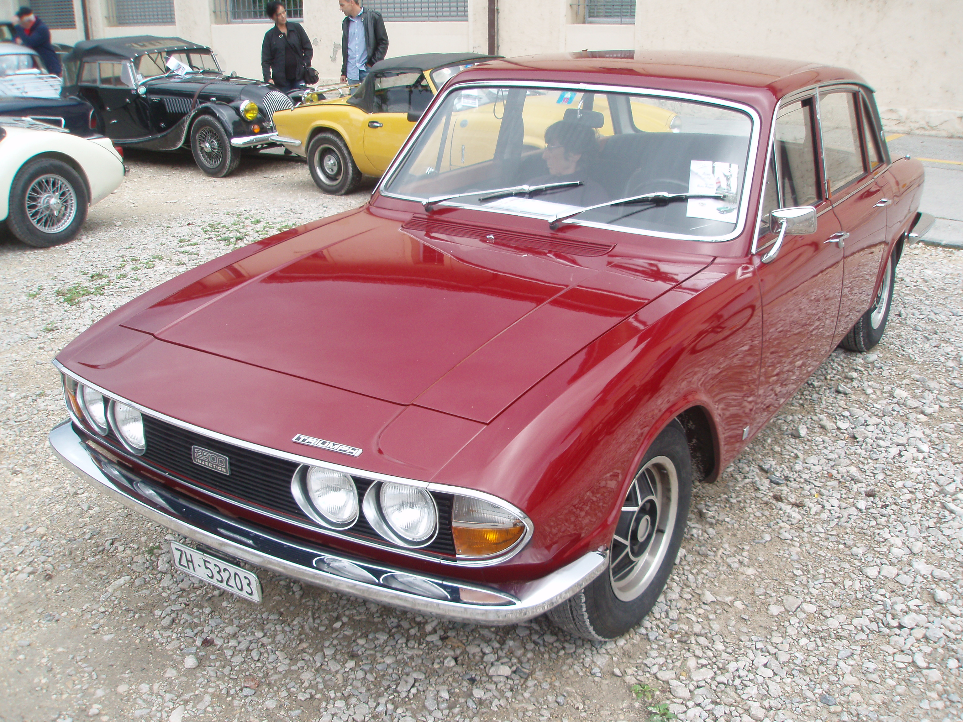 Triumph 2500 PI Mk2